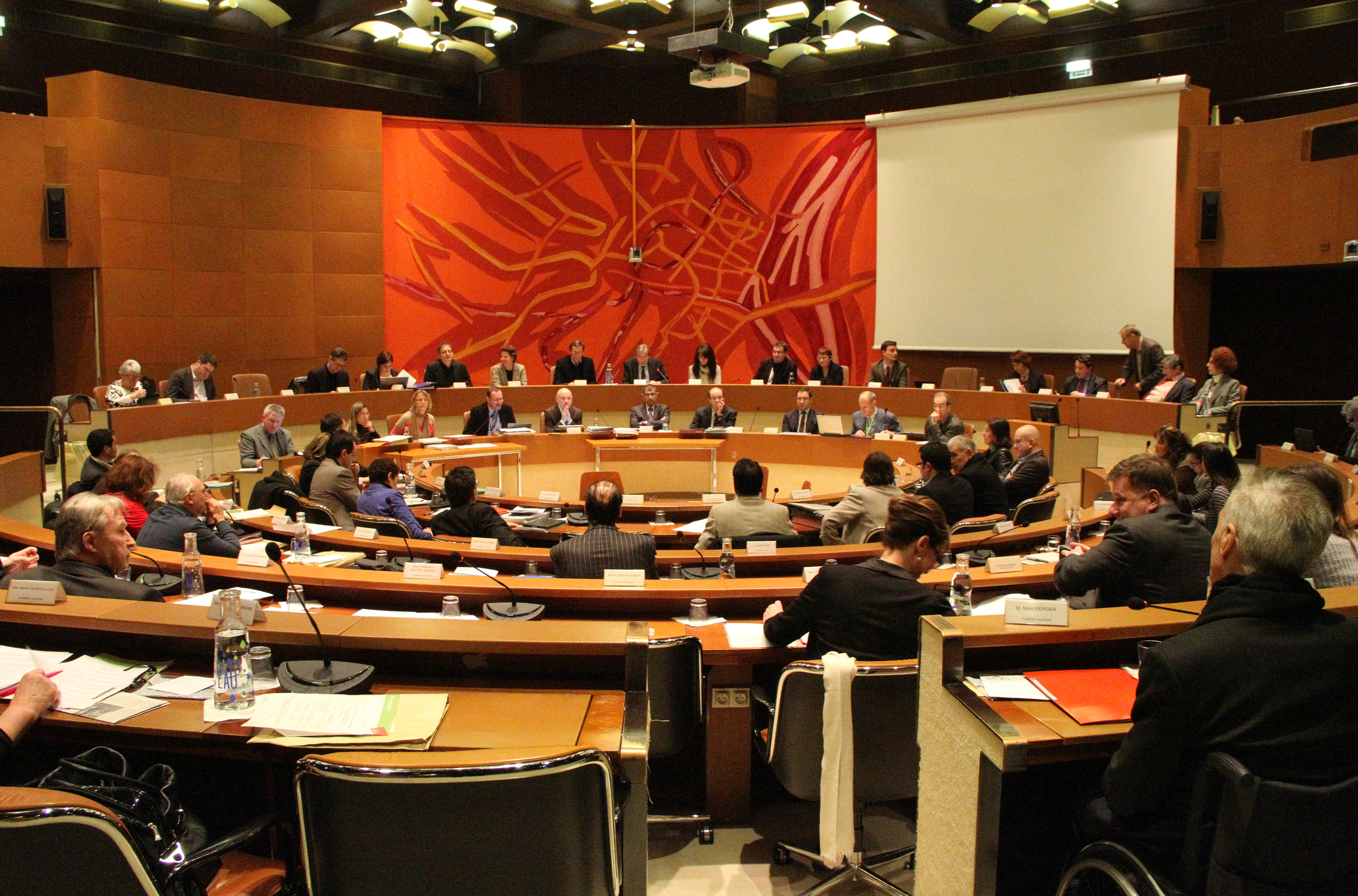 Strasbourg conseil municipal du 21 janvier 2013